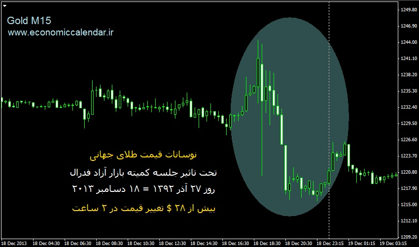 نمودار قیمت طلای جهانی: تغییر قیمت 28 دلاری طی 2 ساعت تحت تاثیر جلسه کمیته بازار آزاد فدرال